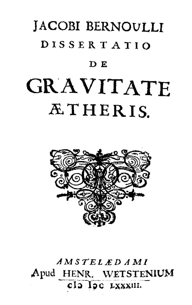 Jacobi Bernoulli Dissertatio de gravitate aetheris. - Amstelaedami : apud Henricum Wetstenium, 1683. - [16], 269, [3] p. : 4 c. di tav. ripiegate ; 8º .